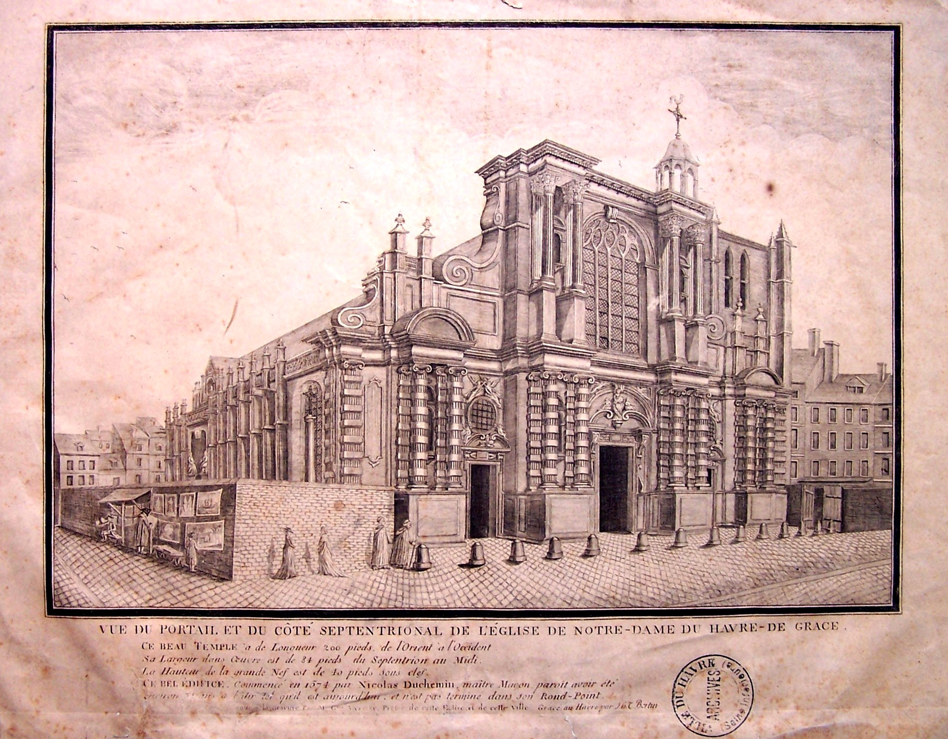 Gravure représentant la façade occidentale de la cathédrale, sans son fronton cintré. Textes de la gravure: "VUE DU PORTAIL ET DU CÔTÉ SEPTENTRIONAL DE L'ÉGLISE DE NOTRE-DAME DU HAVRE-De-GRACE" "CE BEAU TEMPLE a de longueur 200 pieds de l'Orient à l'Occident. Sa largeur dans l'œuvre est de 84 pieds du Septentrion au Midi. La hauteur de la grande nef est de 40 pieds sous clef." "CE BEL ÉDIFICE, commencé en l'an 1574 par Nicolas Duchemin, maître Maçon, paraît avoir été environ 32 ans à batir tel qu'il est aujourd'hui; et n'est pas terminer dans son rond-point. Dessiné en 1768..."